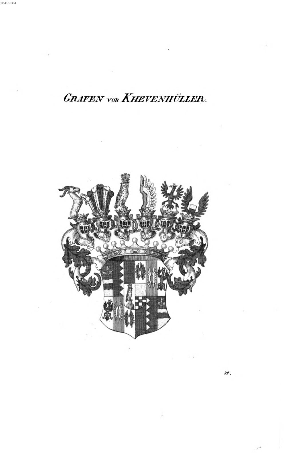 Wappen Khevenhüller - Tyroff HA.jpg